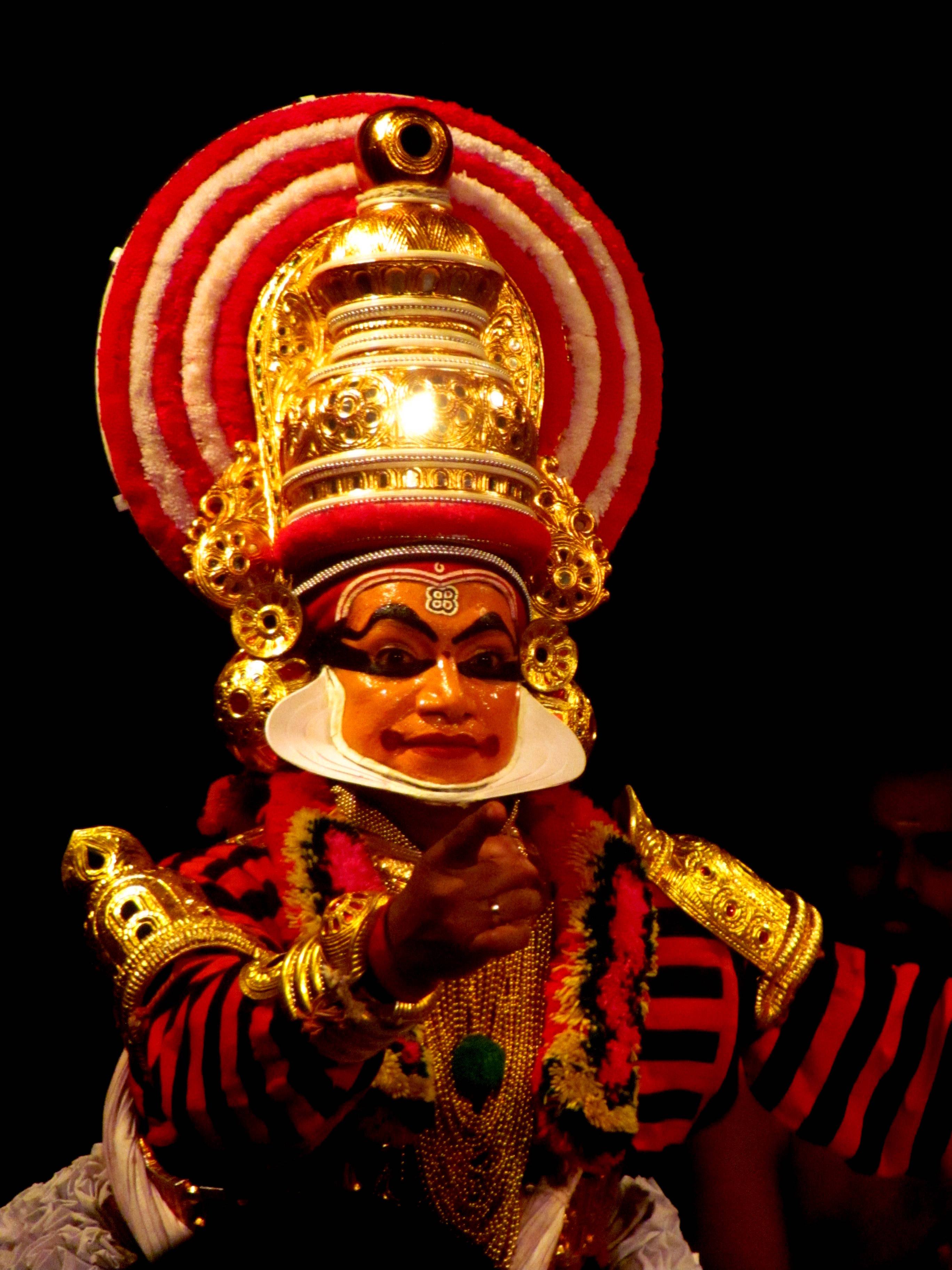 പറക്കും കൂത്ത്